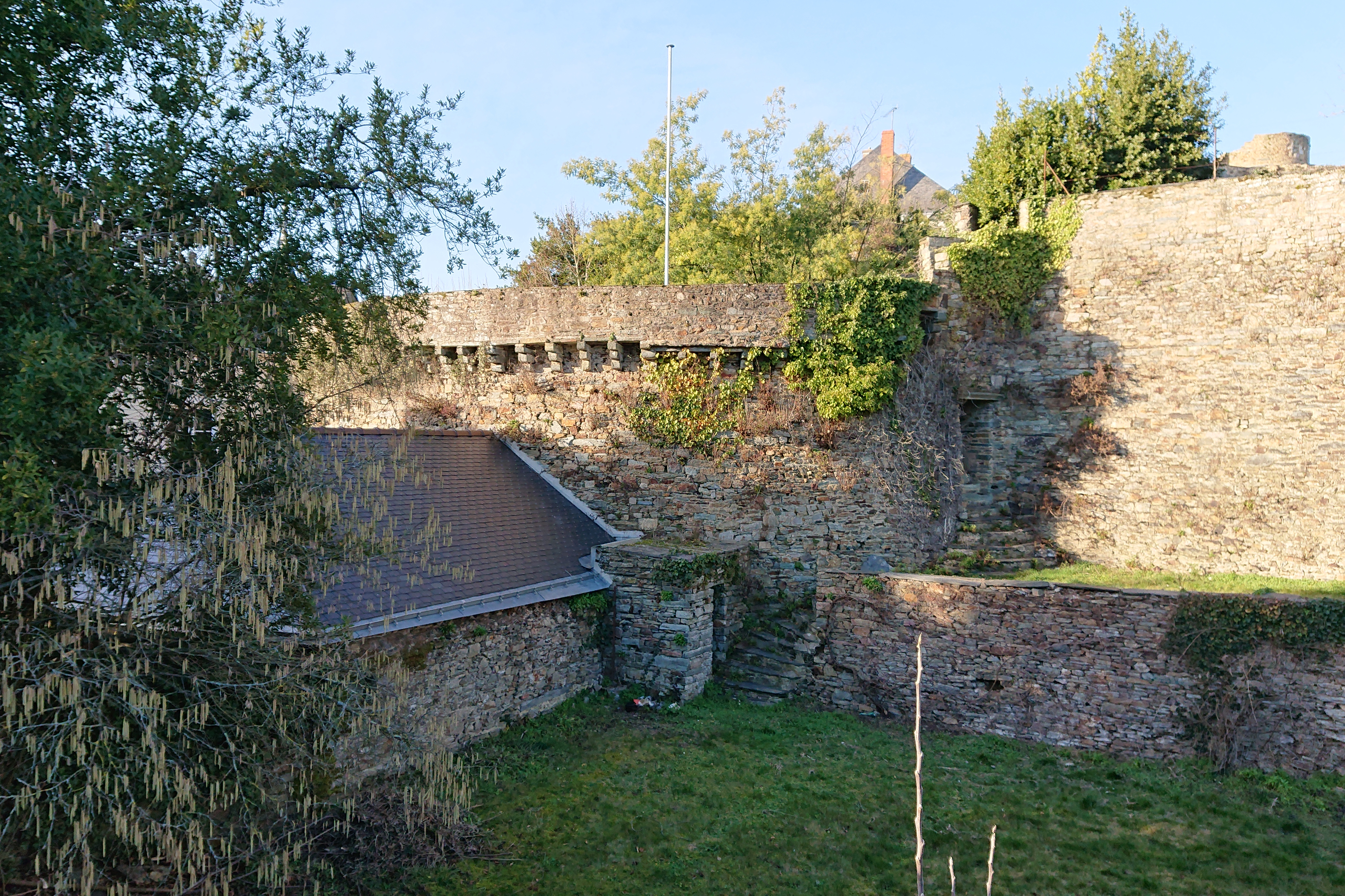 Bastion du Château de Châteaubriant, France.